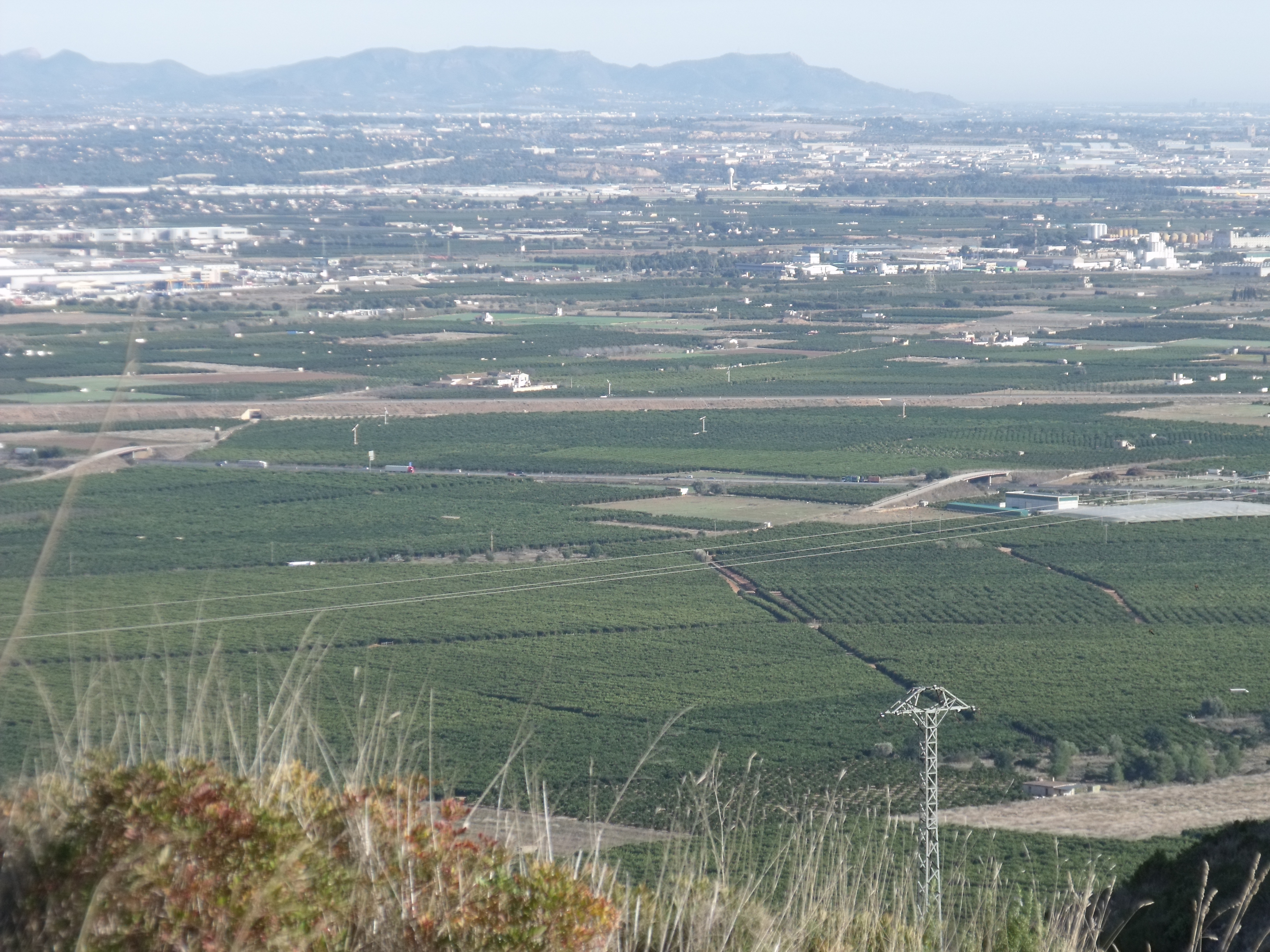 Pla de Quart visto desde la Sierra Perenxisa.